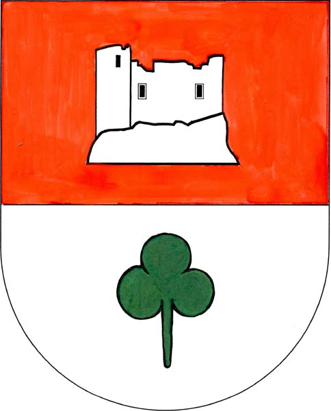 Znak obce Zavlekov